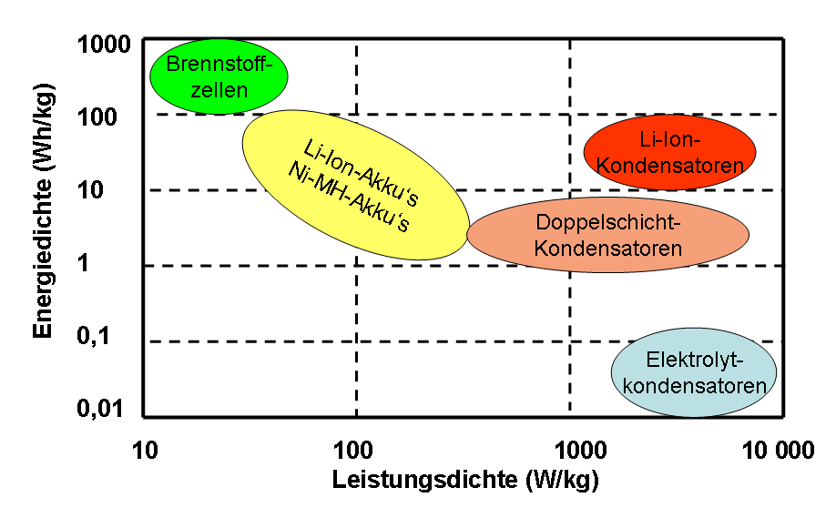 Diagramm über die Leistungs-und die Energiedichte verschiedener Technologien elektrische Energiespeicherung